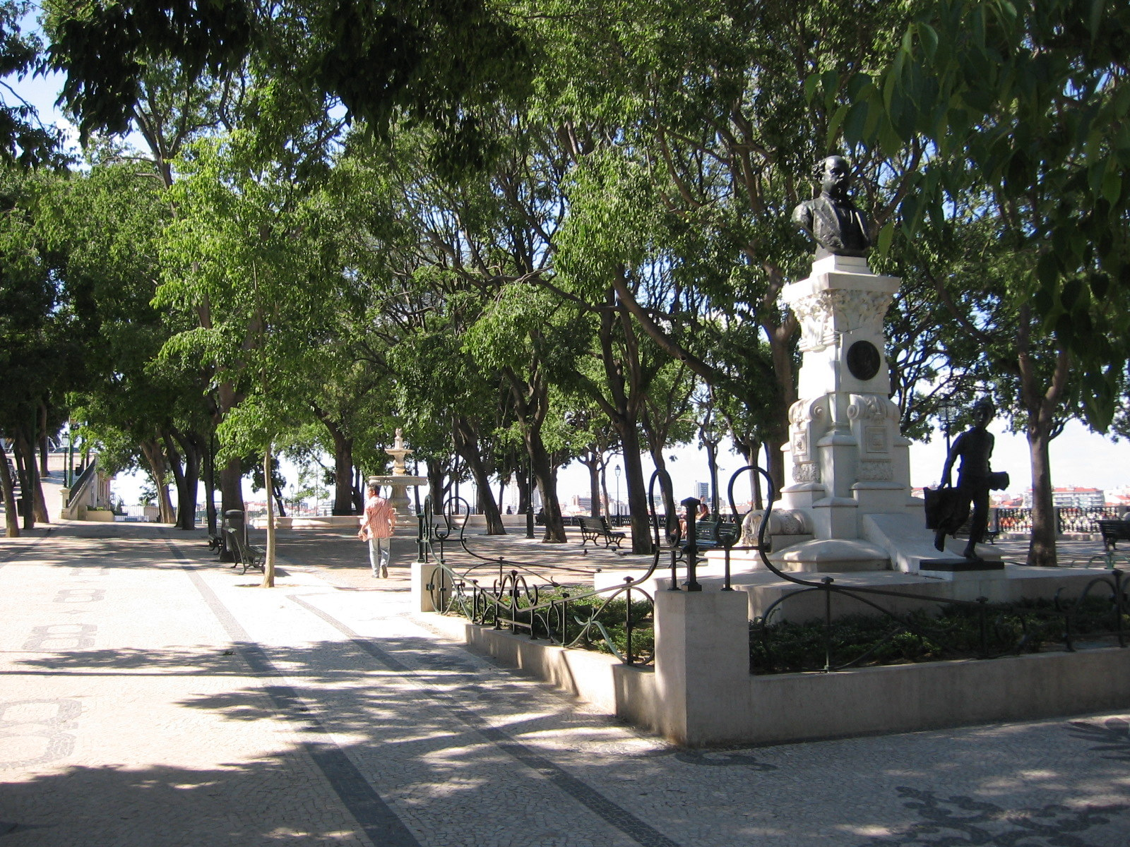 Jardim de São Pedro de Alcântara, Lisboa, Portugal